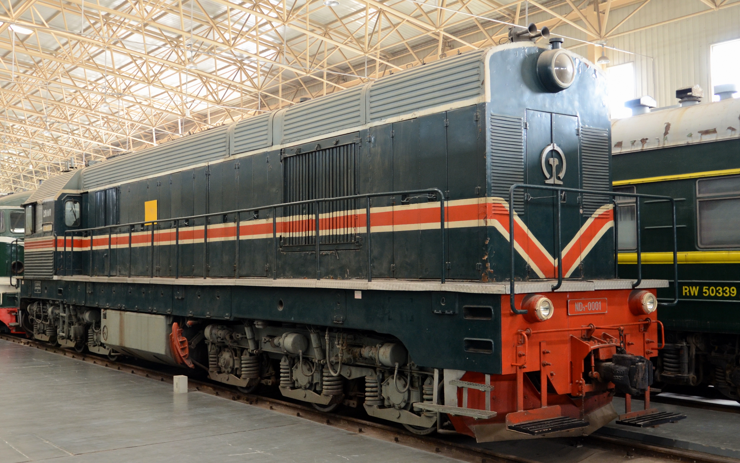 ND3型0001号机车保存在中国铁道博物馆